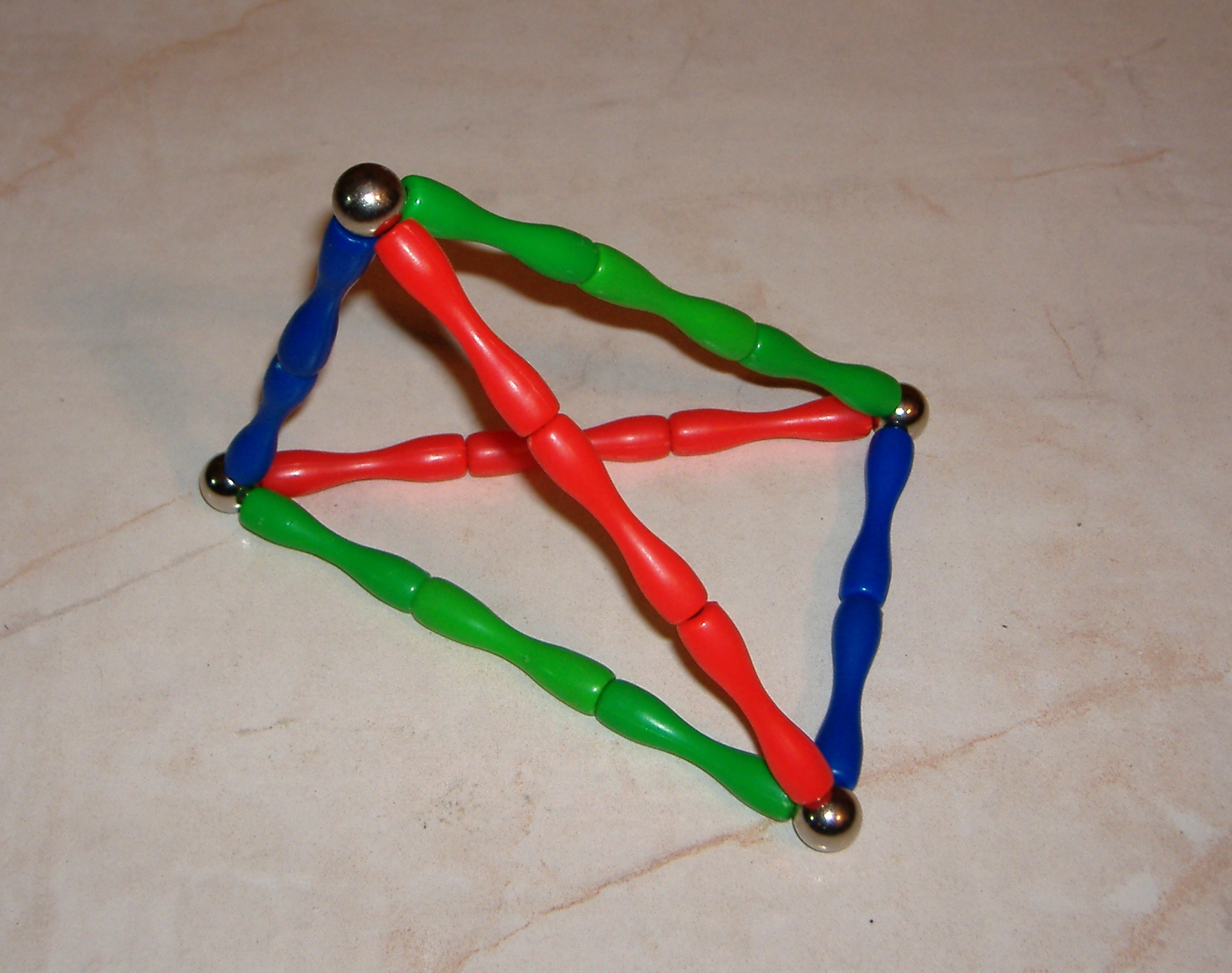 יתדון טטרגונלי